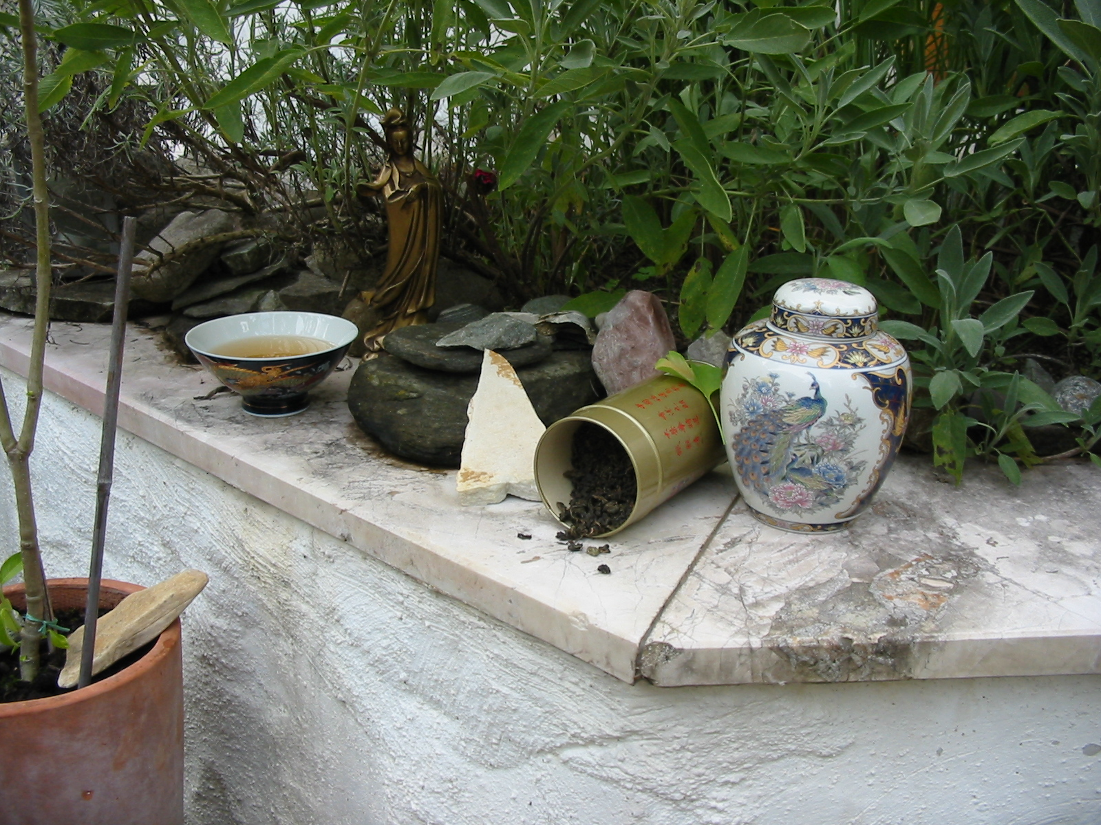 Tin Kuan Yin ensemble